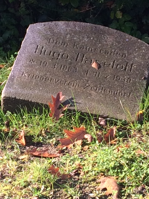 Grabstein für Hugo Haseloff, auf dem Friedhogf Onkel-Tom-Str. in Berlin-Zehlendorf